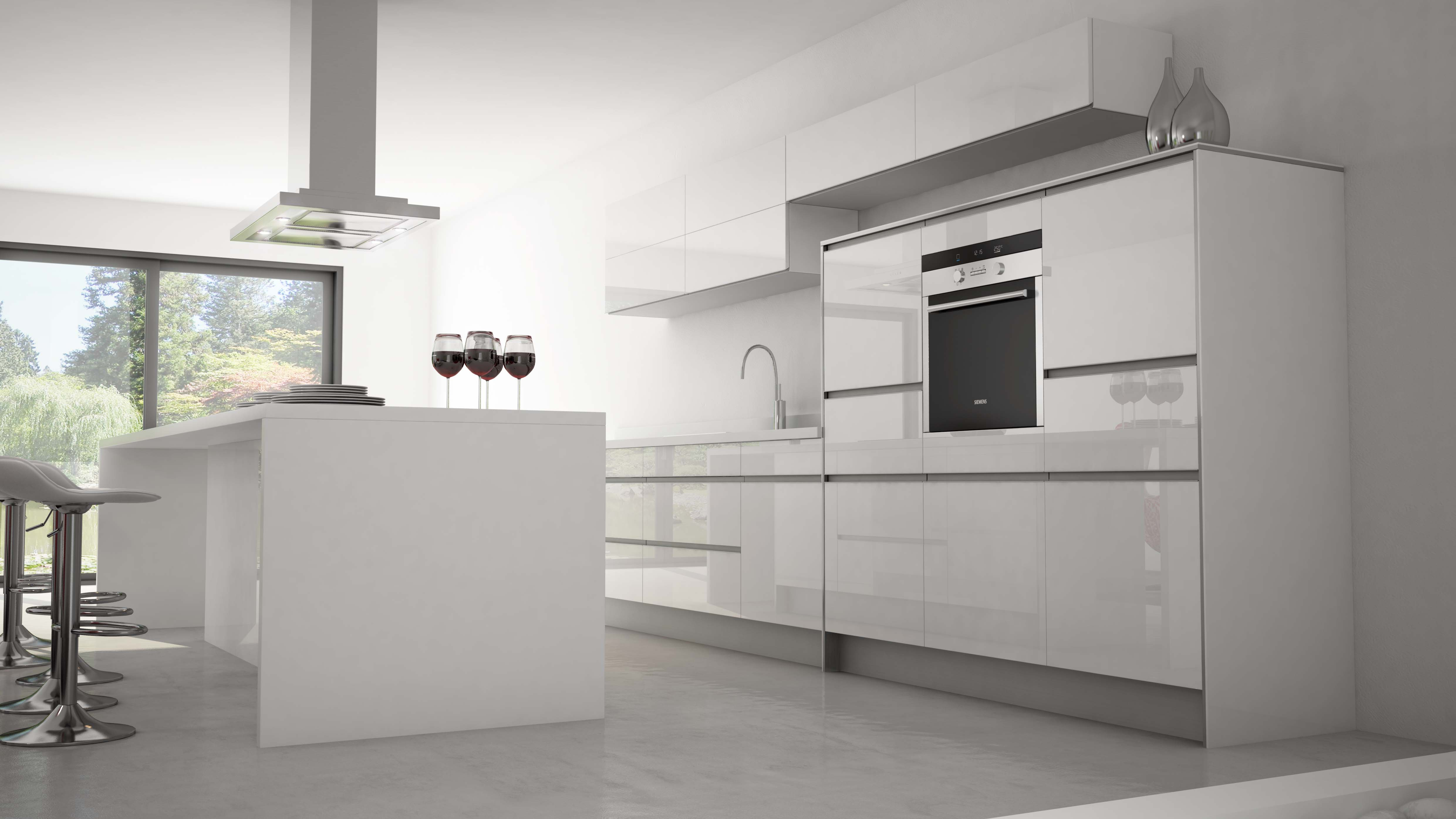 COMERA, modèle de cuisine FUSION de la gamme Dynamic